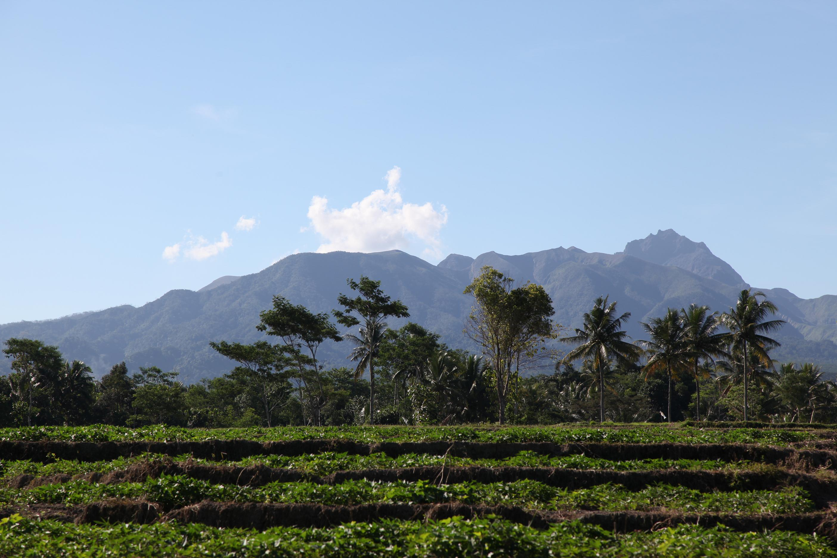 Gunung Kelud (Kelud Mount)